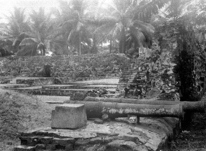 Negatief. Kanonnen in Fort Speelwijk, Bantam